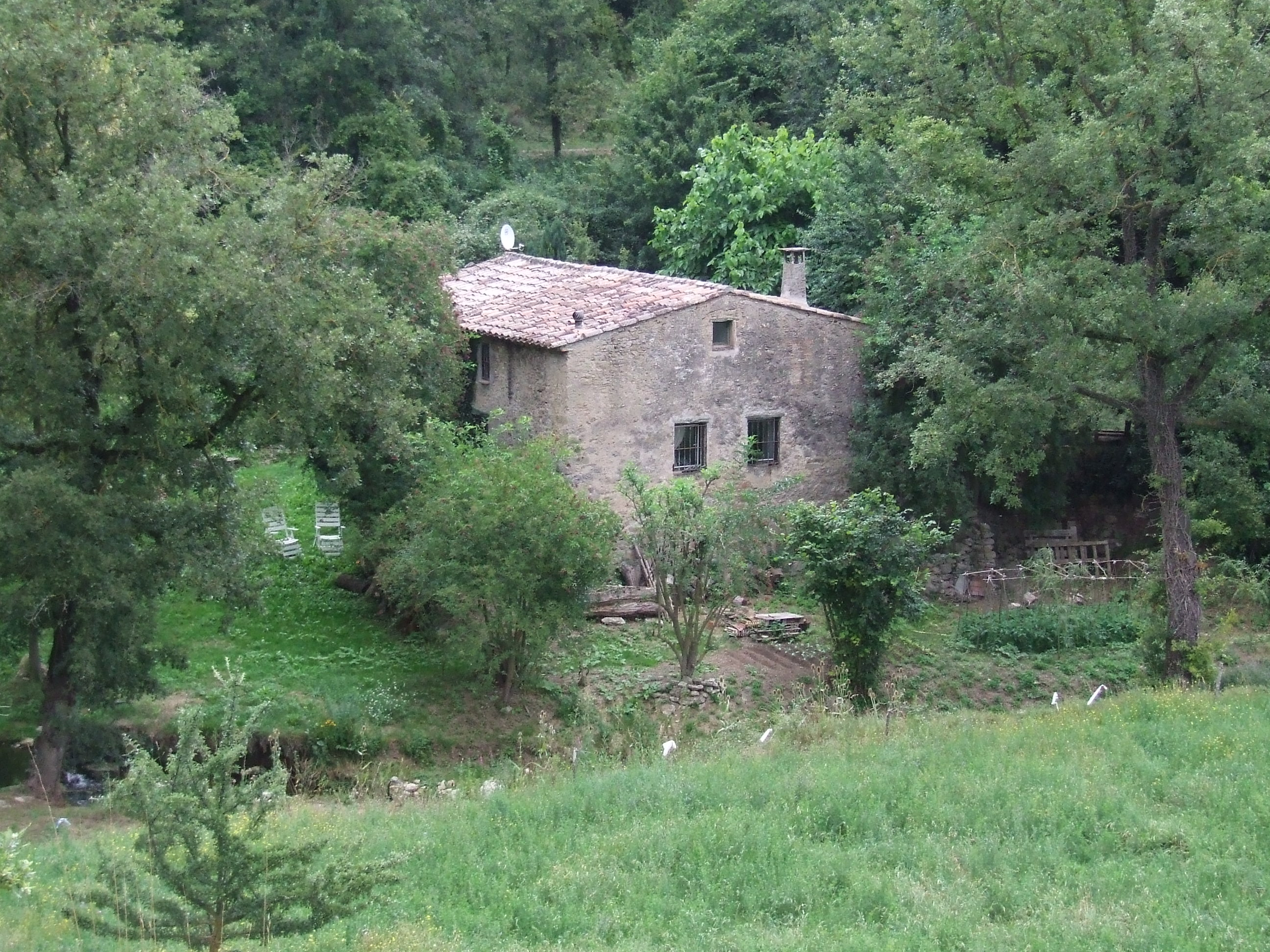 El Molí Vell (Castellcir, Moianès)